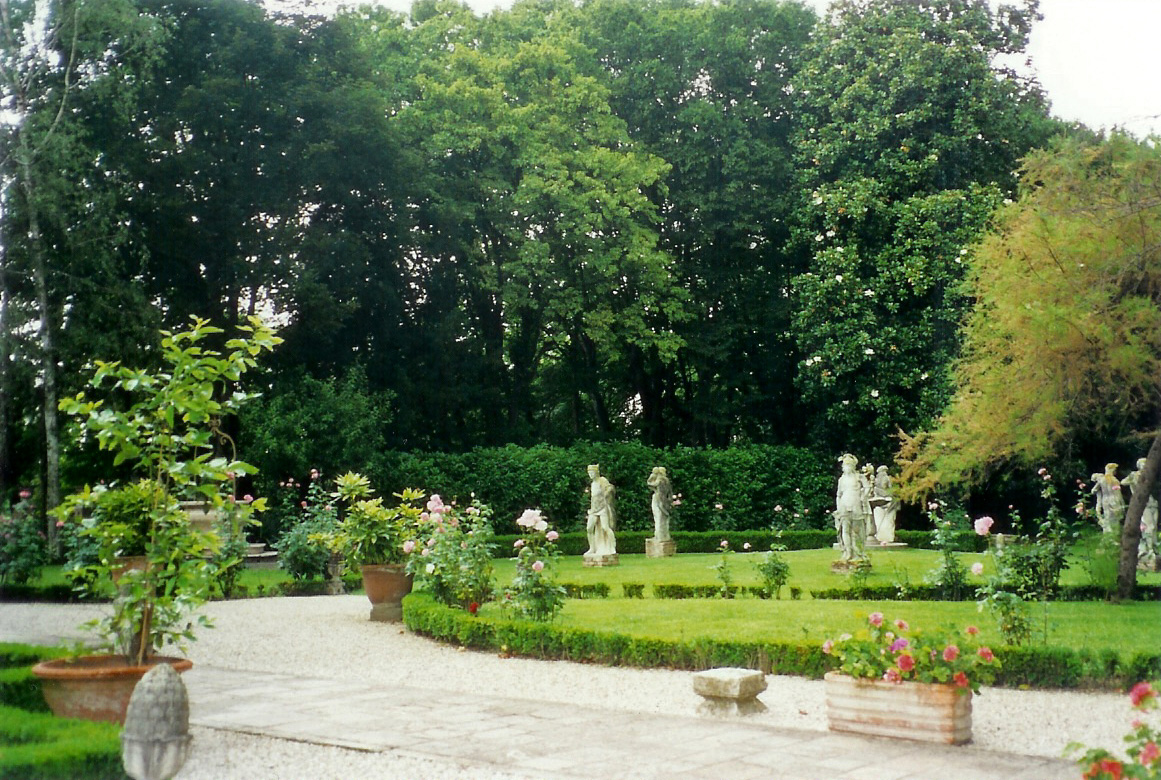 Villa Widmann Rezzonico Foscari, Mira, the garden